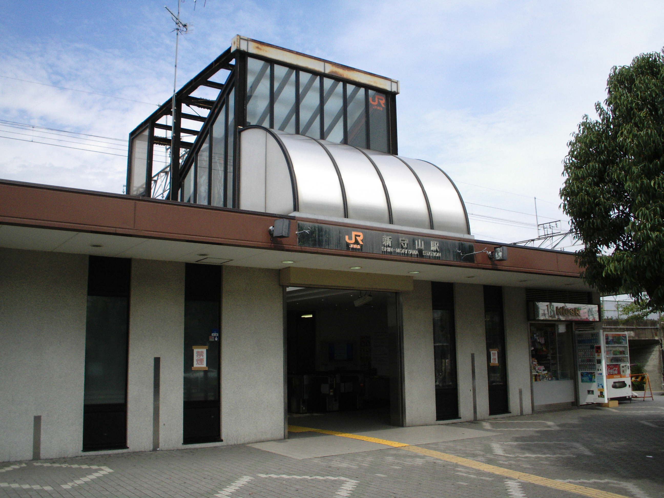 新守山駅